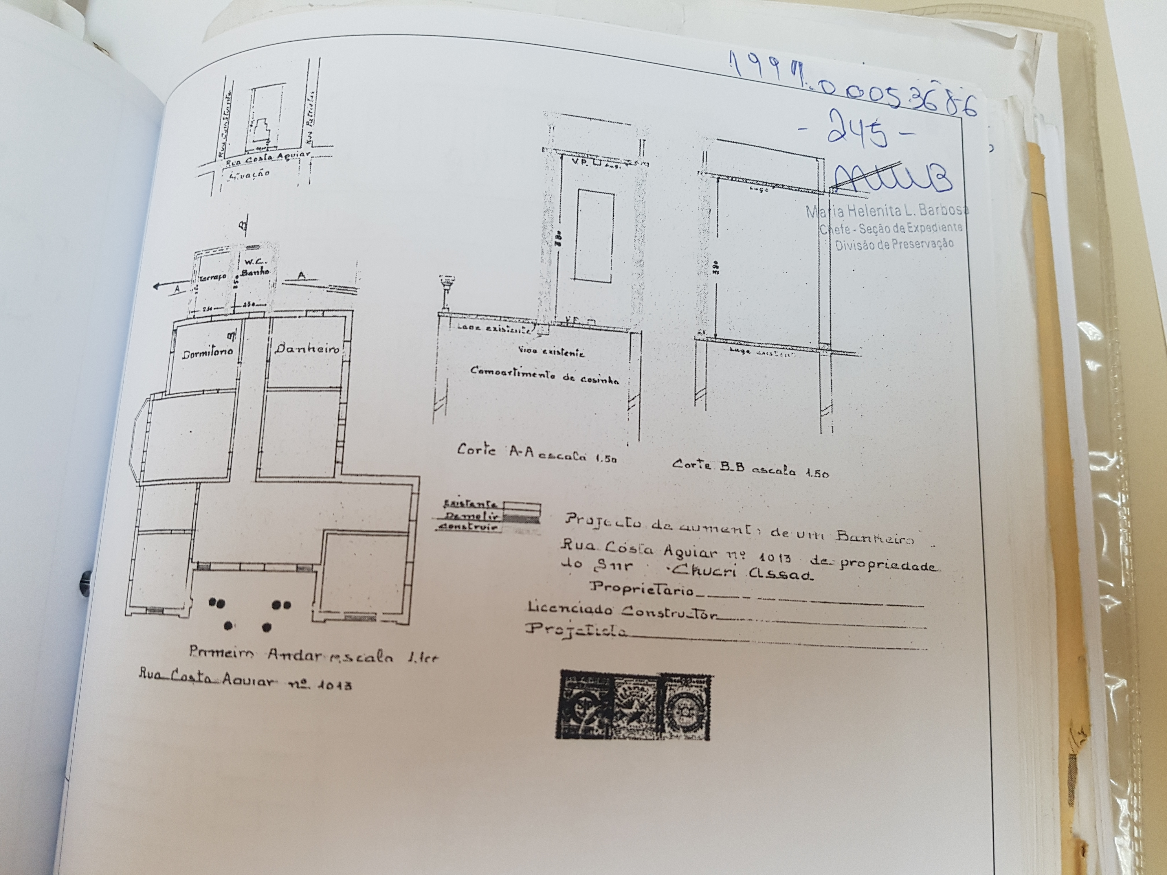 Planta da residência daFamília Jafet destinada a Chucri Assad.